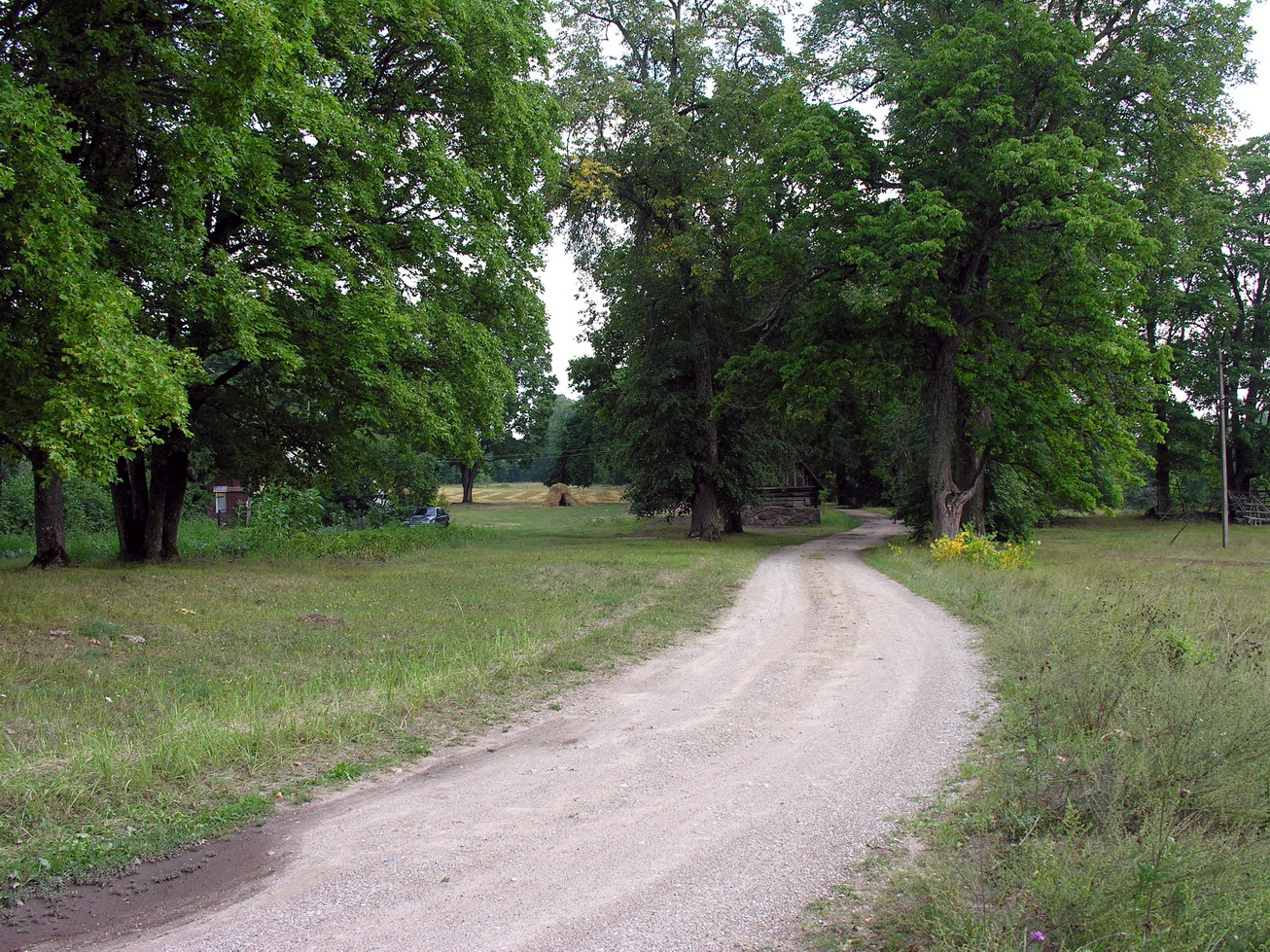 Santekliai, Mažeikių raj., Viekšnių seniūnija Kelias per Santeklių dvarvietę į Uogiškius Foto: Algirdas, 2006 m. rugpjūčio 15 d., Lietuva